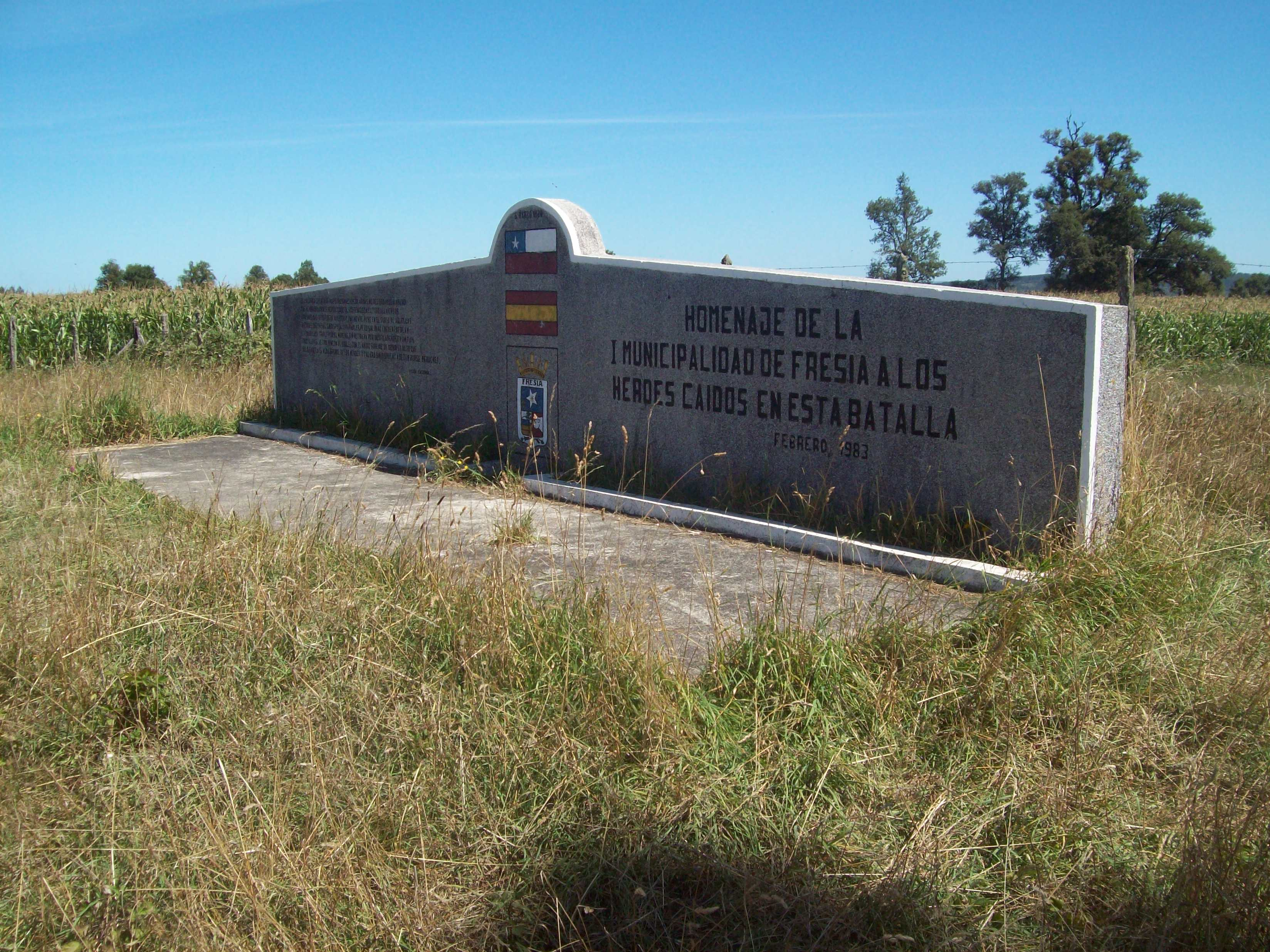 Monumento de la batalla de El Toro, 6 de Marzo 1820, guerra de la independencia de Chile